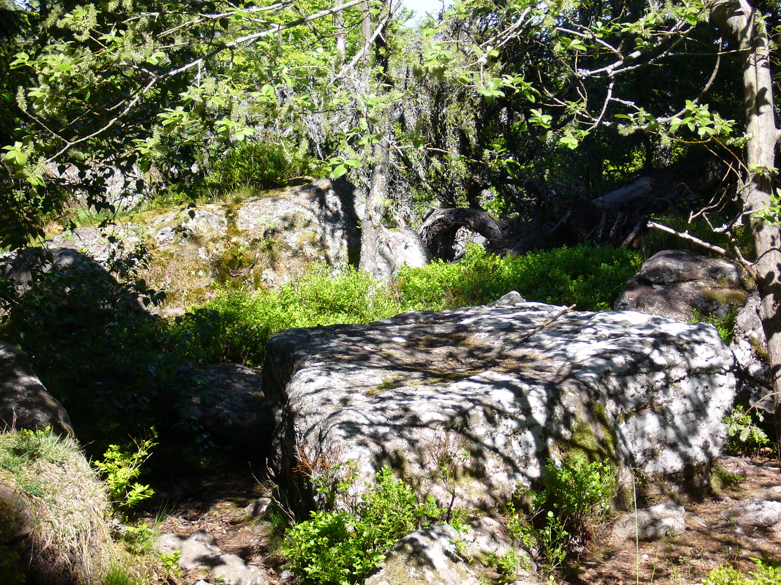 Taennchel 165.JPG